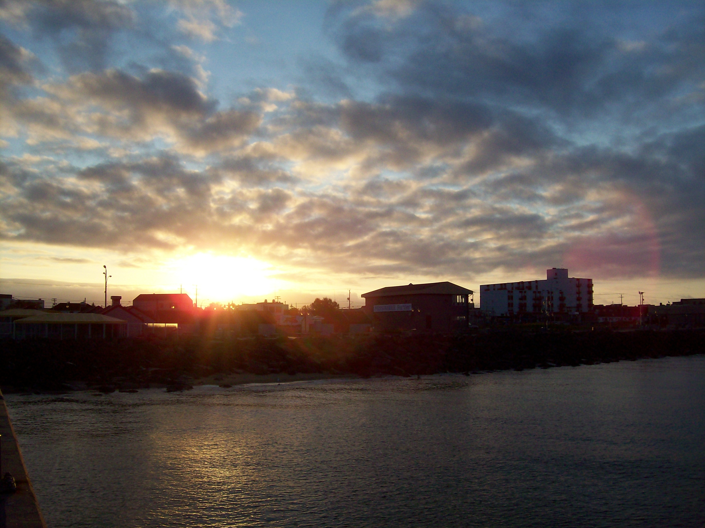 Lever de Soleil sur Sept-Îles, Québec, Canada. Prise de vue du quai le plus au nord.